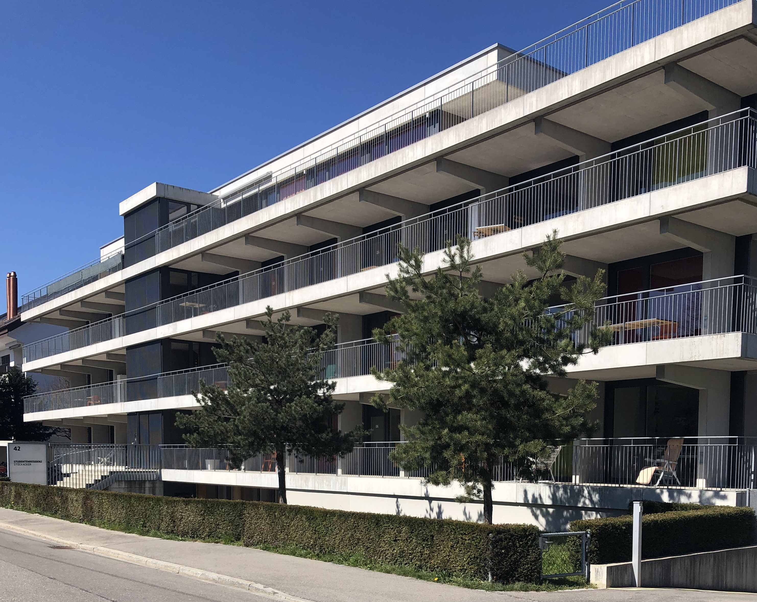 Untermatt Studentenwohnheim